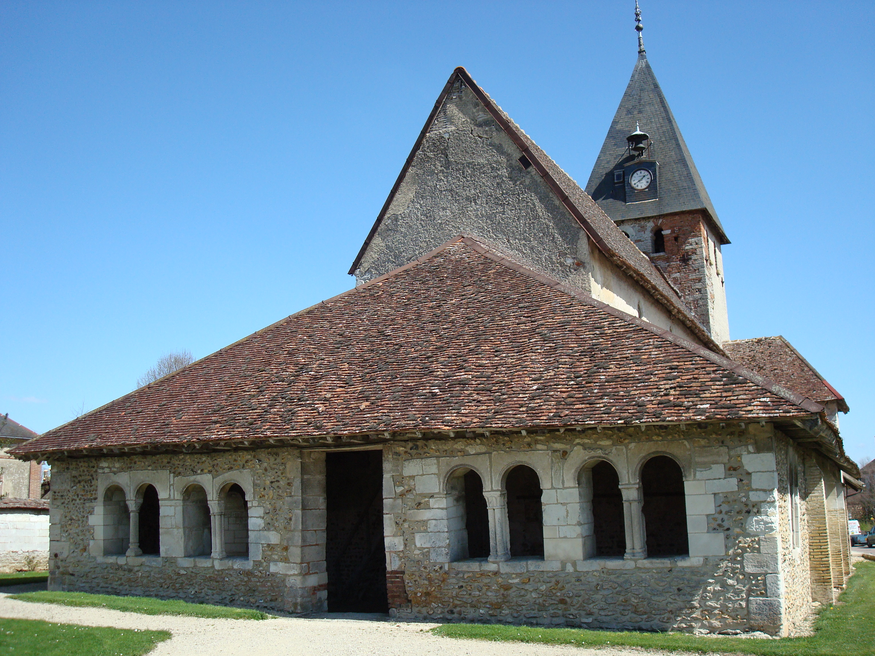 Eglise de Moussey